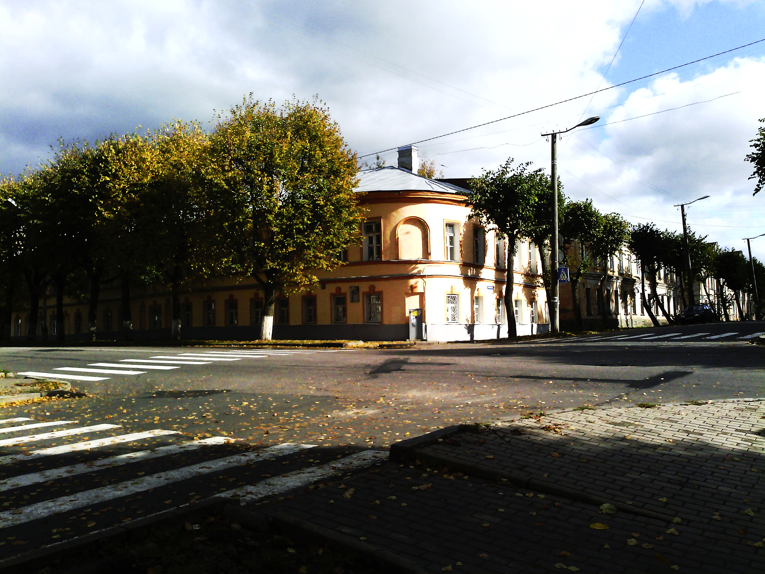 Дом Сметанина (Новгородская область, Великий Новгород, Большая Московская улица, 8)